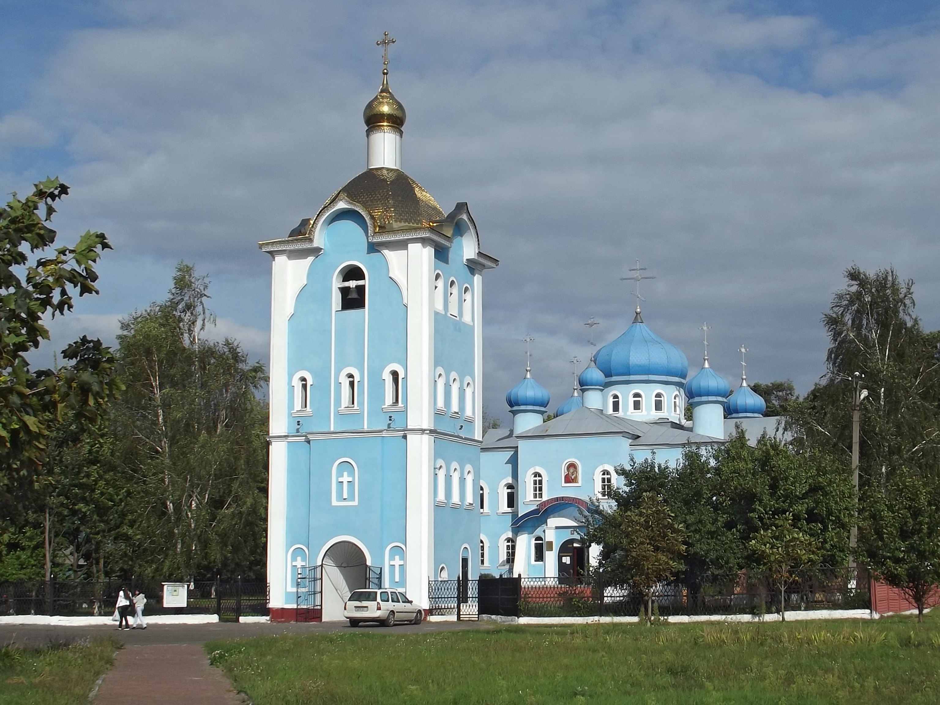 Казанская церковь